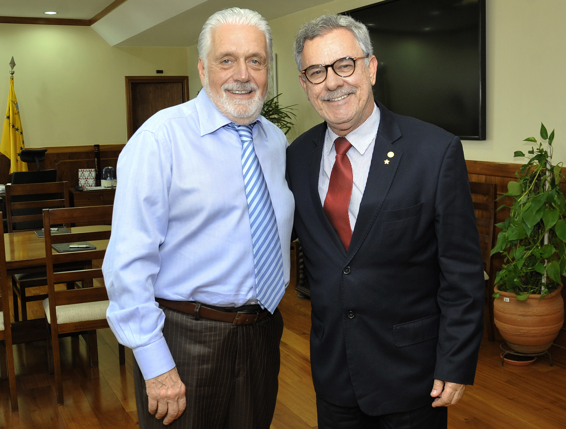 Então Ministro da Defesa Jaques Wagner (gravata azul) recebe em audiência o deputado Waldenor Pereira (PT-BA).